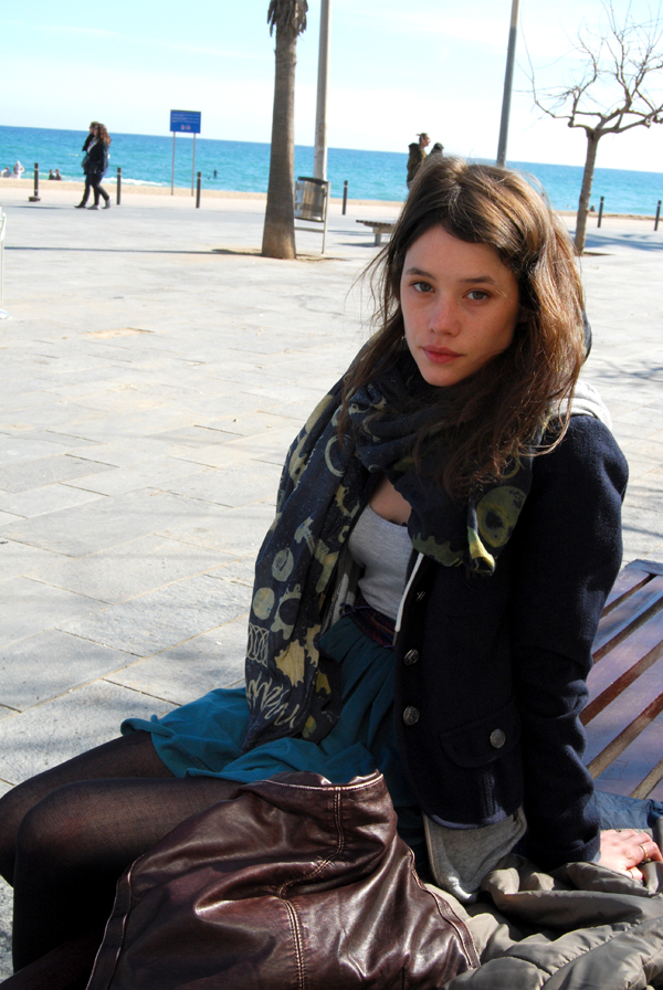 Àstrid Bergès-Frisbey durante el rodaje de El sexo de los Ángeles